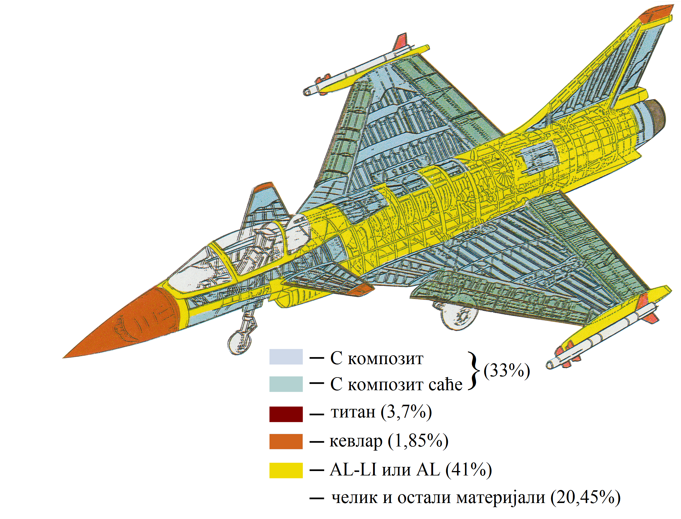 Sahara направио у оквиру Идејног пројекта Новог авиона 1986. године, а мало је поправио 2016.